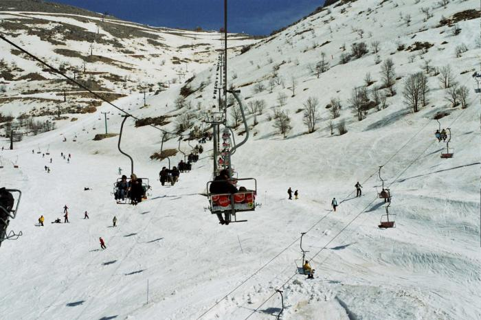 עליה ברכבל לראש החרמון